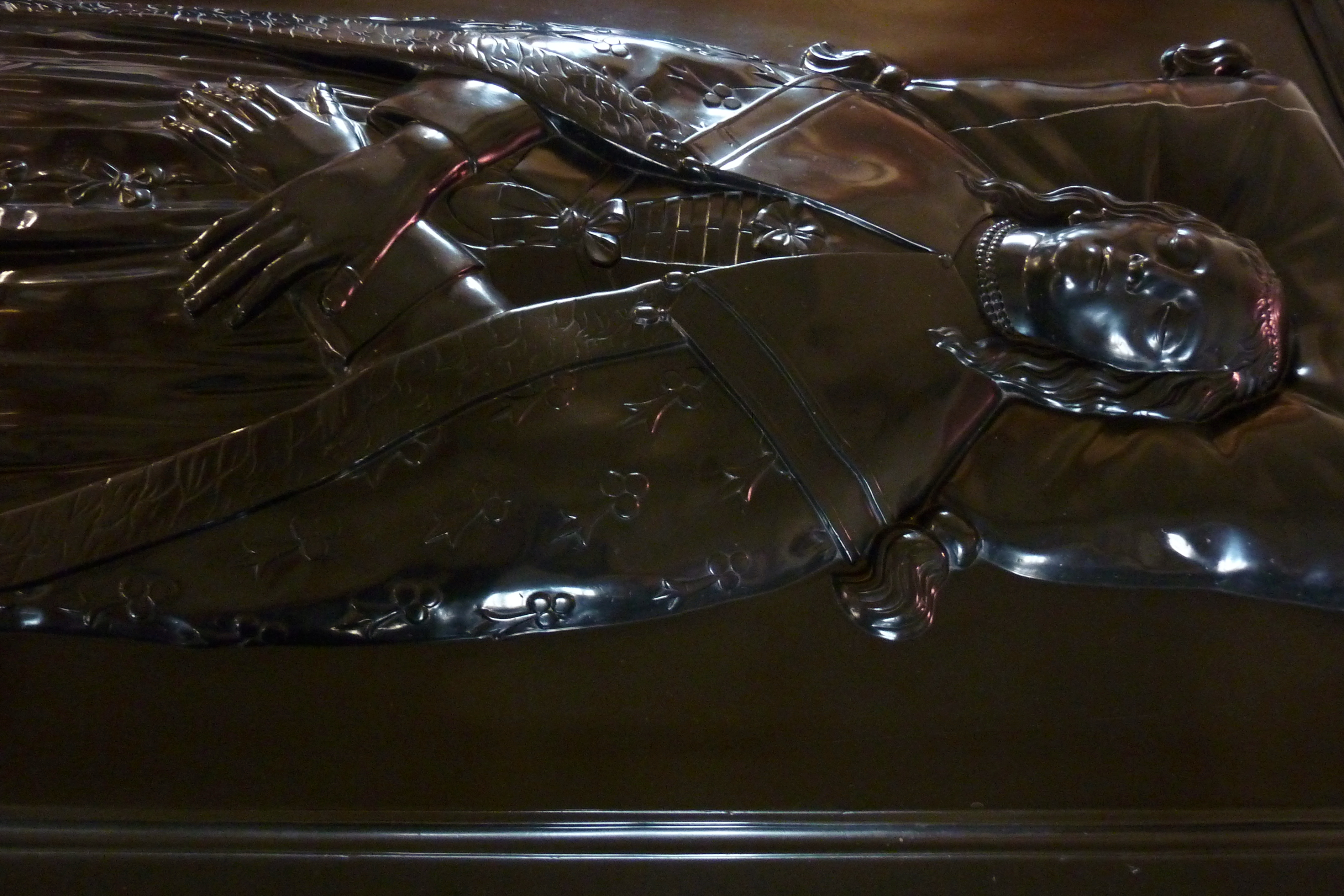 katholische Pfarrkirche St. Nikolaus und Rochus in Mayschoß, Grabmal der Katharina von der Mark